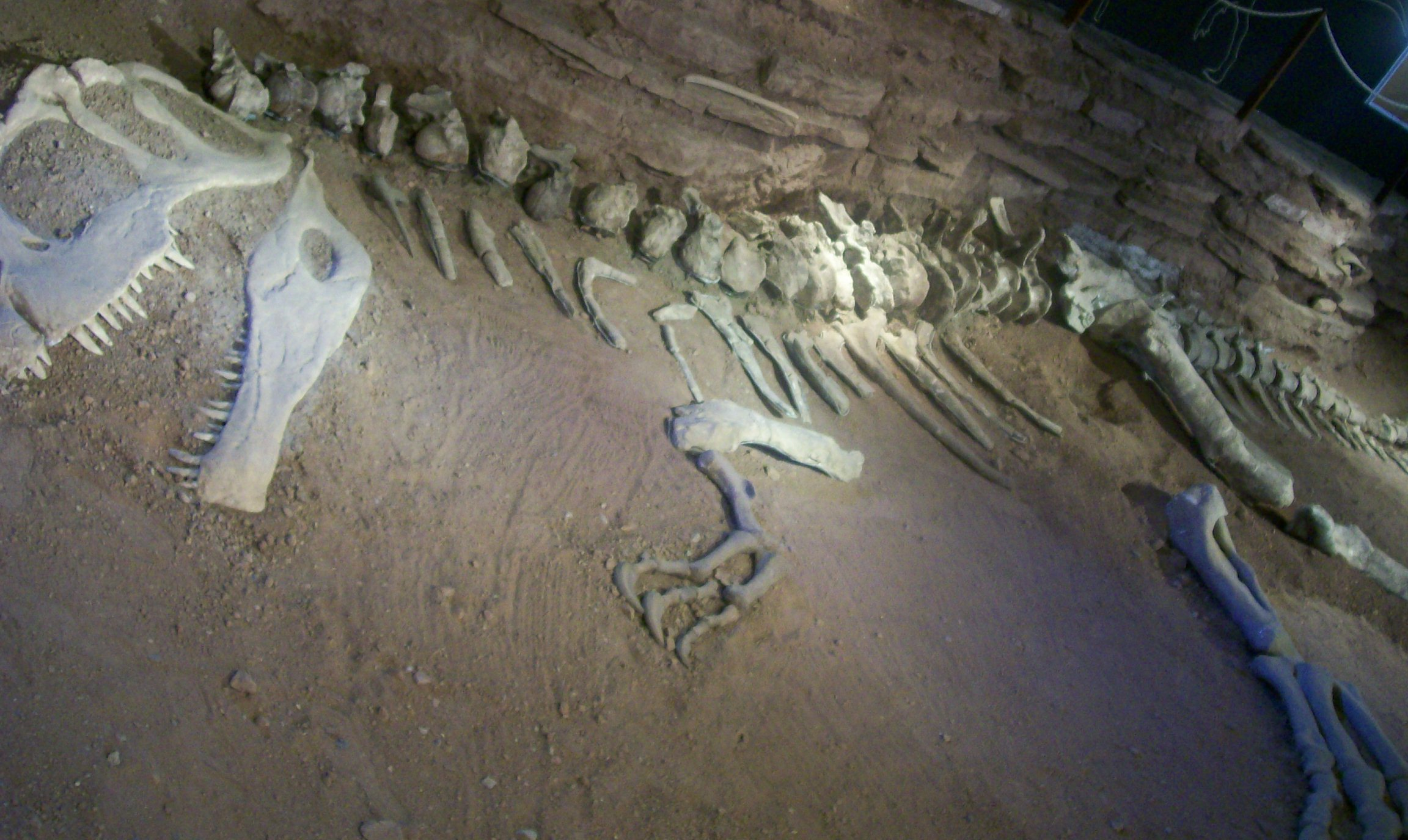 Giganotosaurus carolinii (holotype[1]) en el museo de El Chocón.